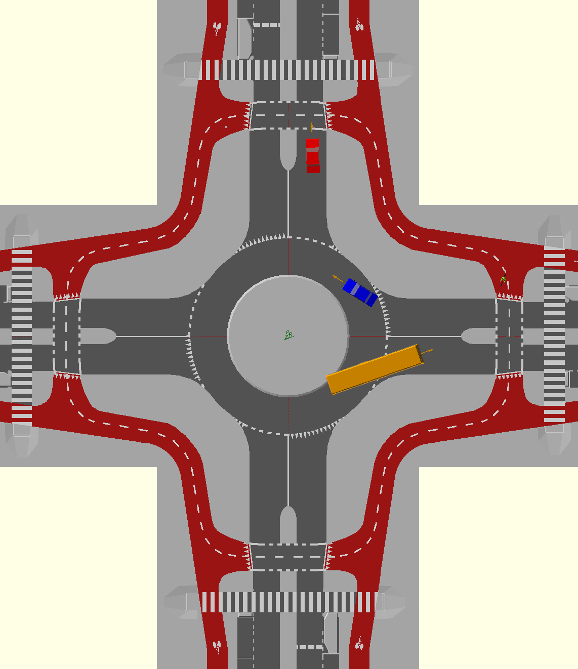 Carrefour giratoire néerlandais avec croisement de la piste cyclable éloigné qui n'a pas priorité sur les véhicules motorisés